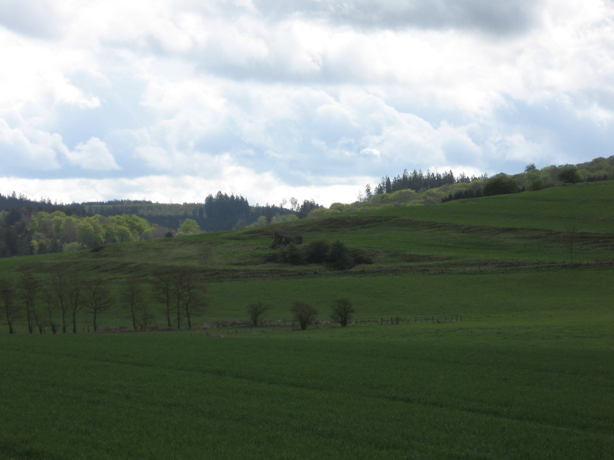 Nördliche Teil der westlichen Fläche des Landschaftsschutzgebietes Grünlandgürtel Südfeld.